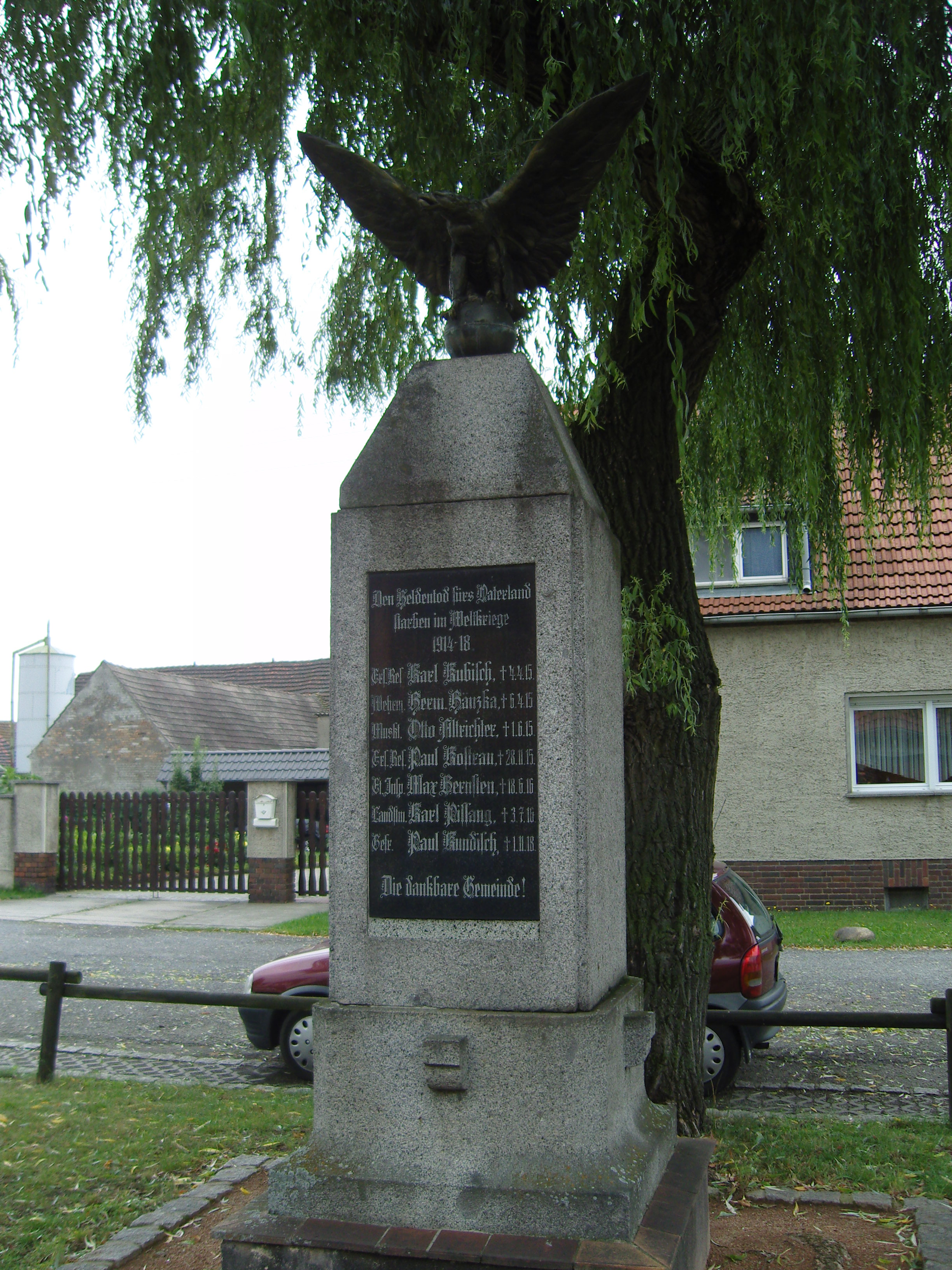 Kriegerdenkmal für die Gefallenen des Ersten Weltkriegs in Biehlen einem Gemeindeteil von Schwarzbach